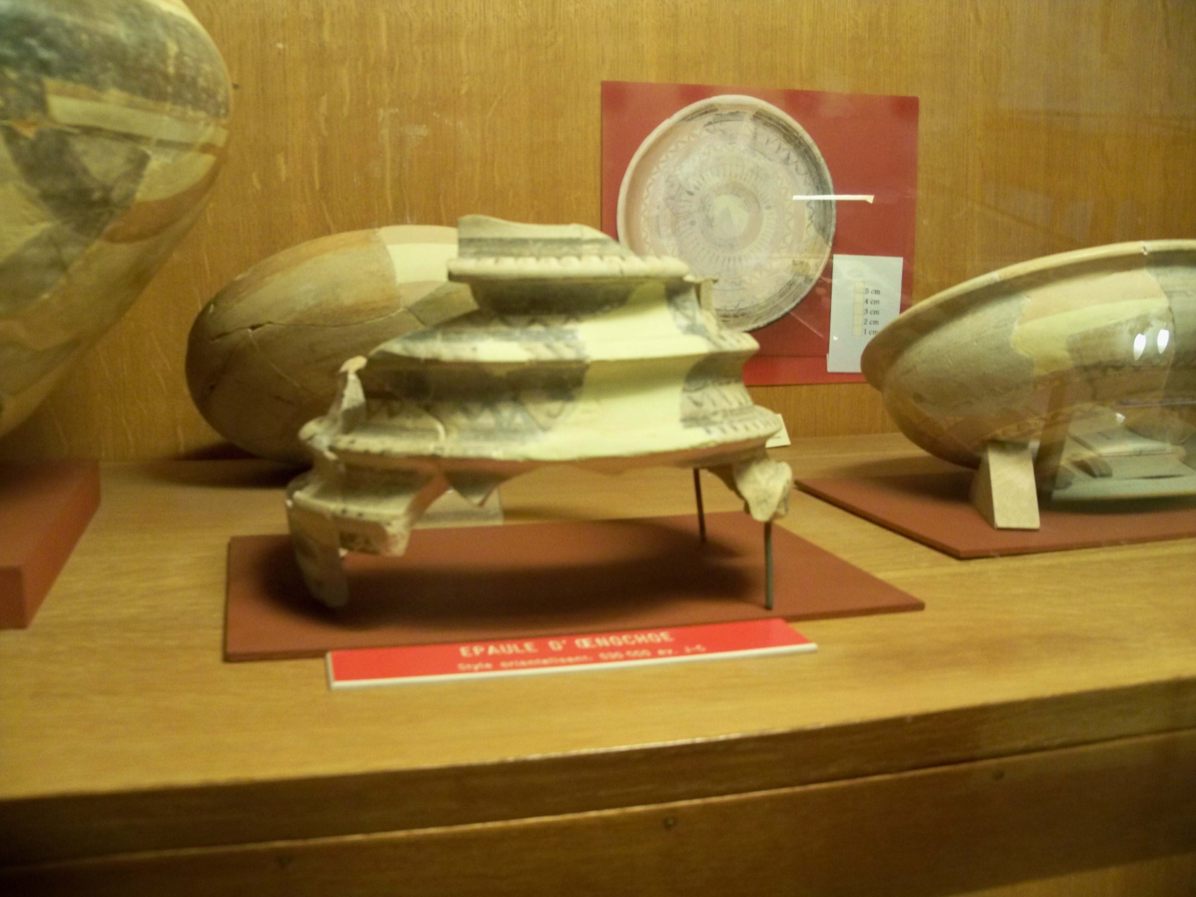 Vase à vin au musée du Pègue, Drôme, France